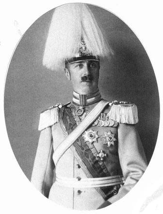 Prinz Aribert von Anhalt (1864-1933)